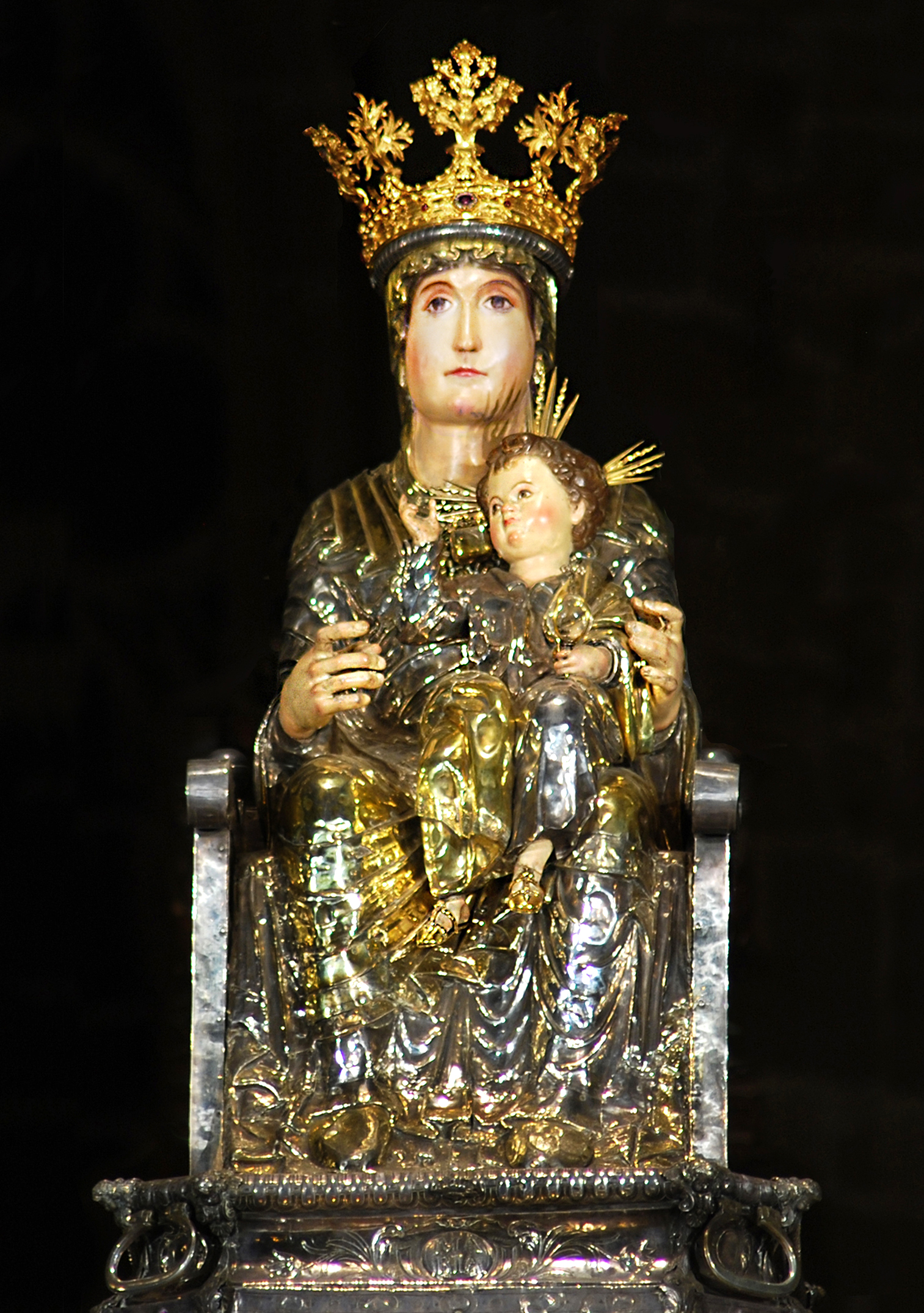 Talla románica del siglo XII de Santa María la Real de Pamplona. Madera cubierta de plata y plata sobredorada.